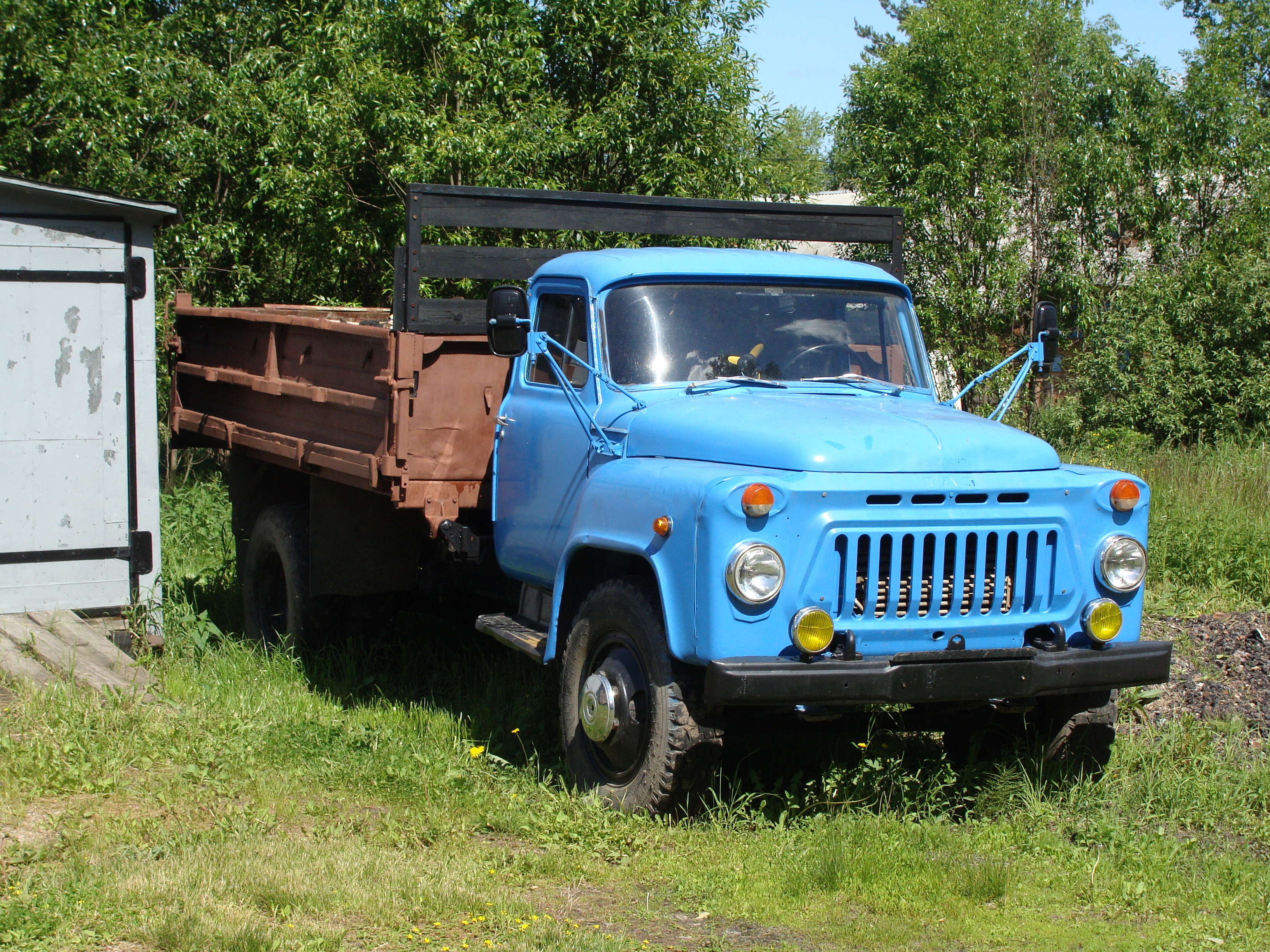 Поселок Вычегодский. Котласский район Архангельской области